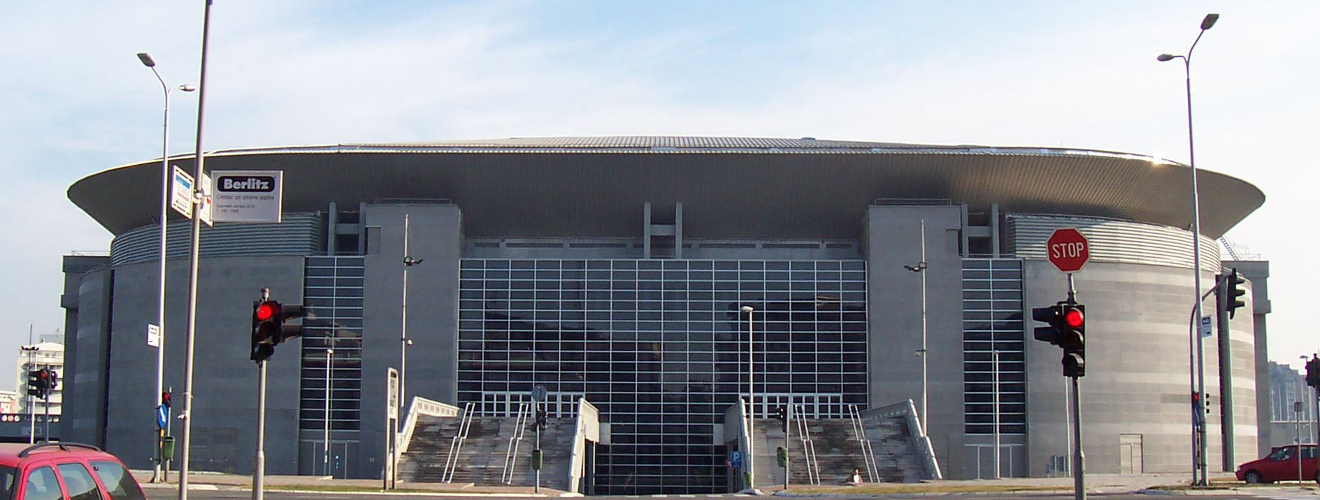 Belgrade Arena view from west